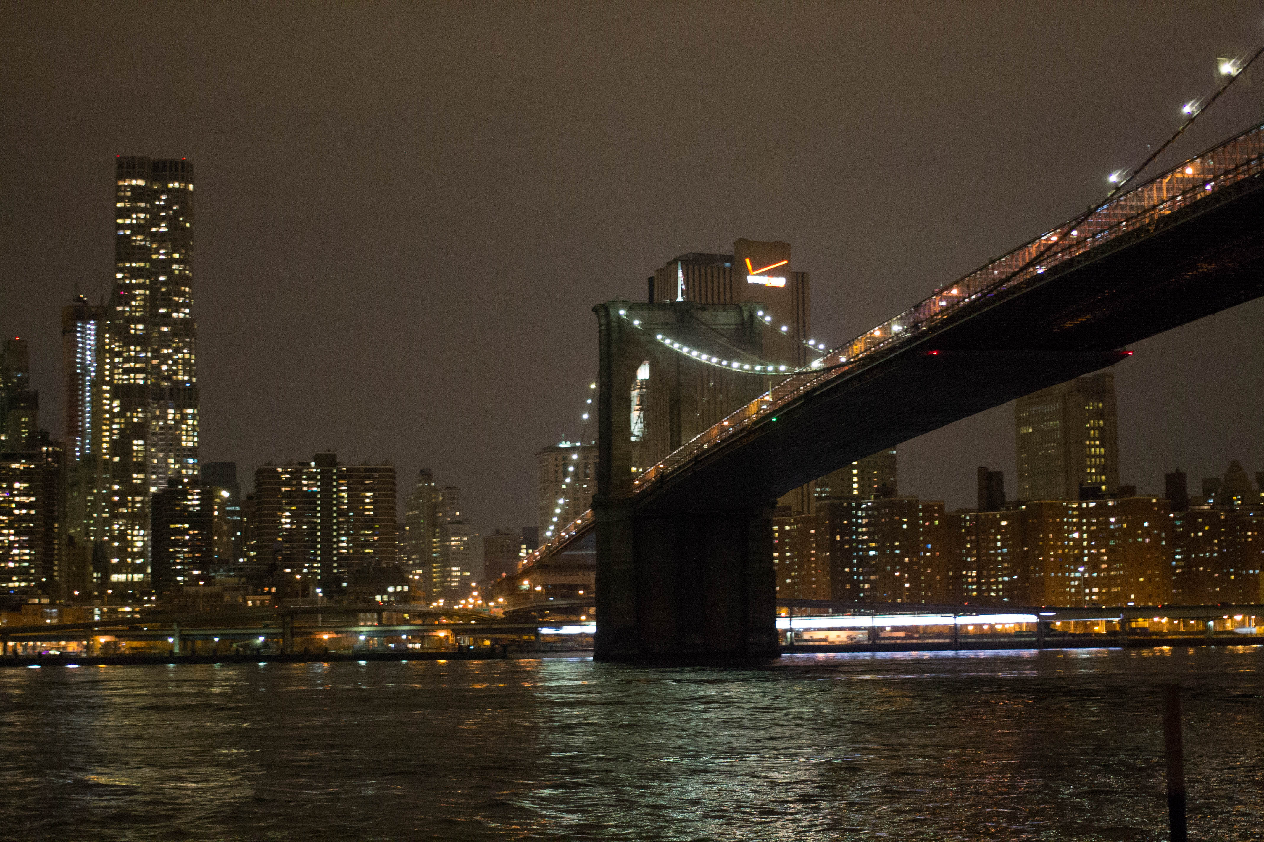 Brooklyn Bridge